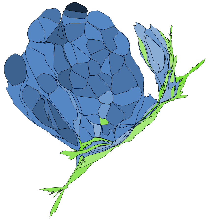 顏色對照表